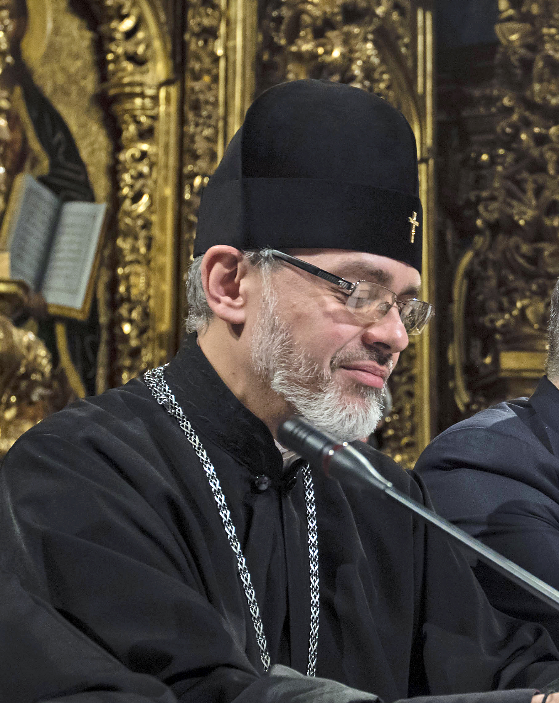 Архиепископ Даниил (Зелинский) в президиуме объединительного собора в Киеве